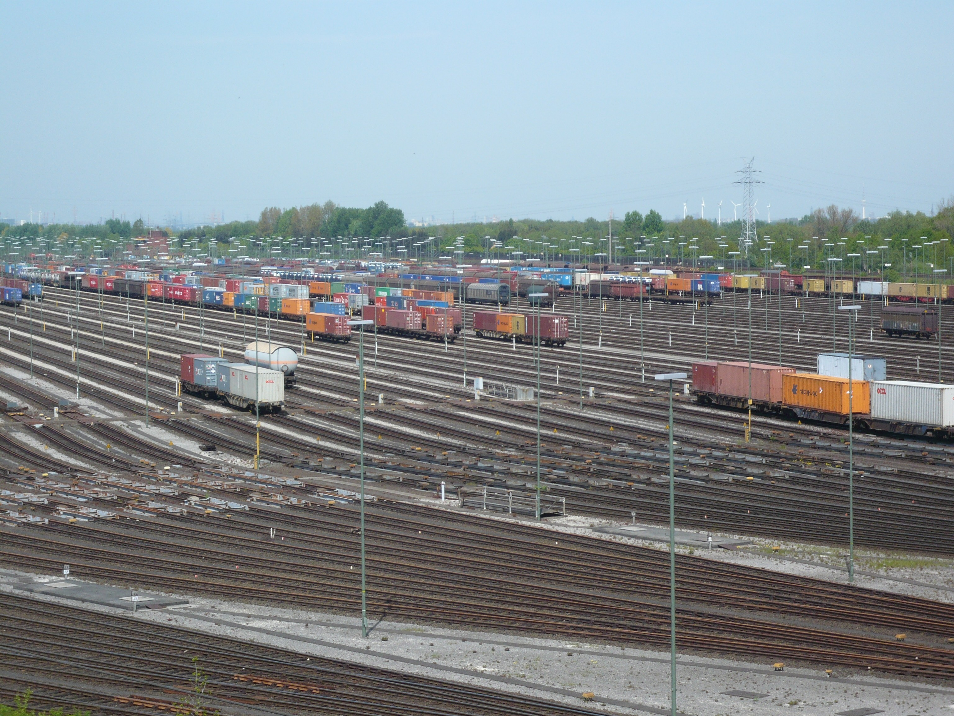 Rangierbahnhof Maschen, Richtungsgruppe Nord-Süd